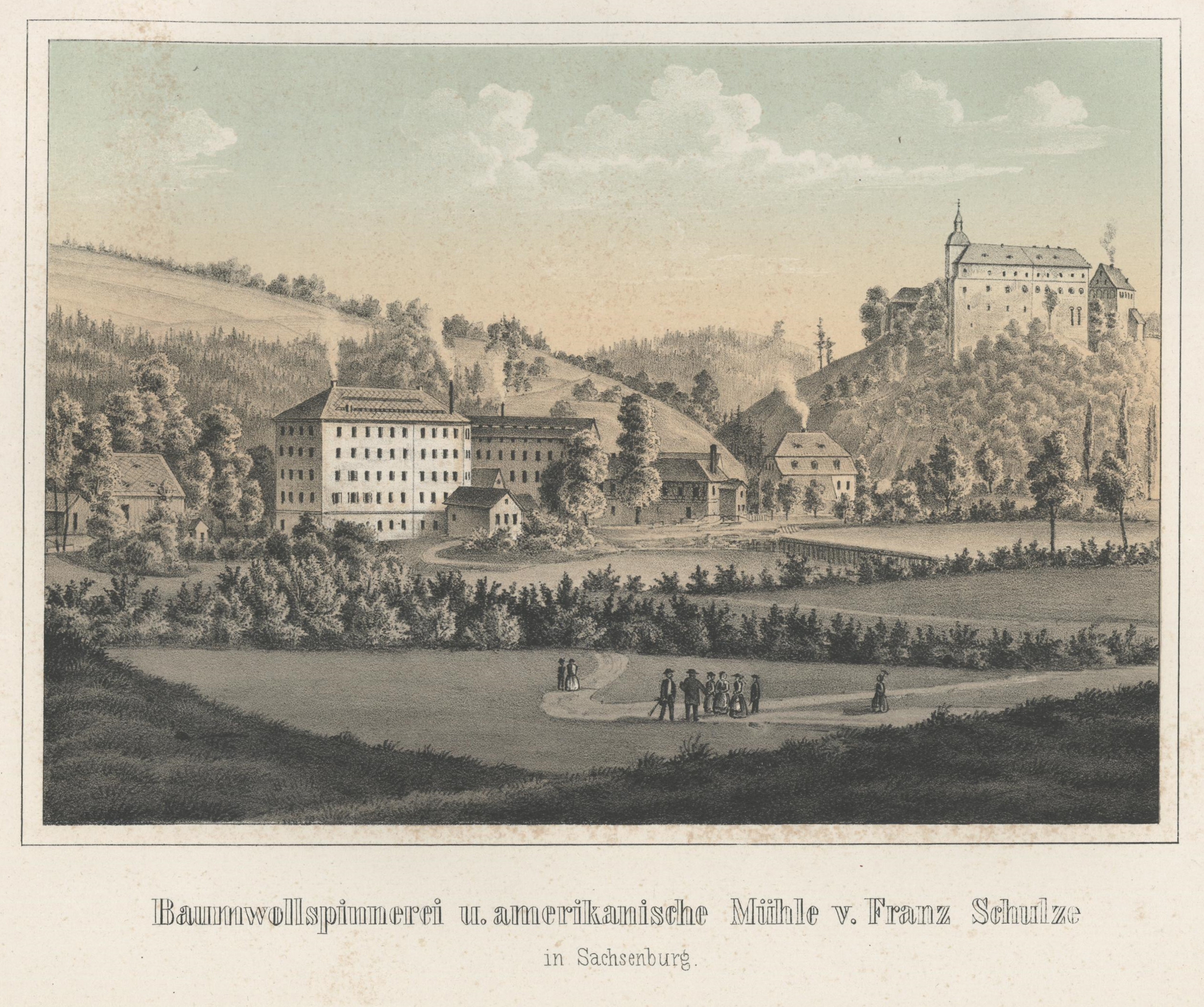 Baumwollspinnerei und amerikanische Mühle von Franz Schulze in Sachsenburg aus: Album der Sächsischen Industrie Zweiter Band